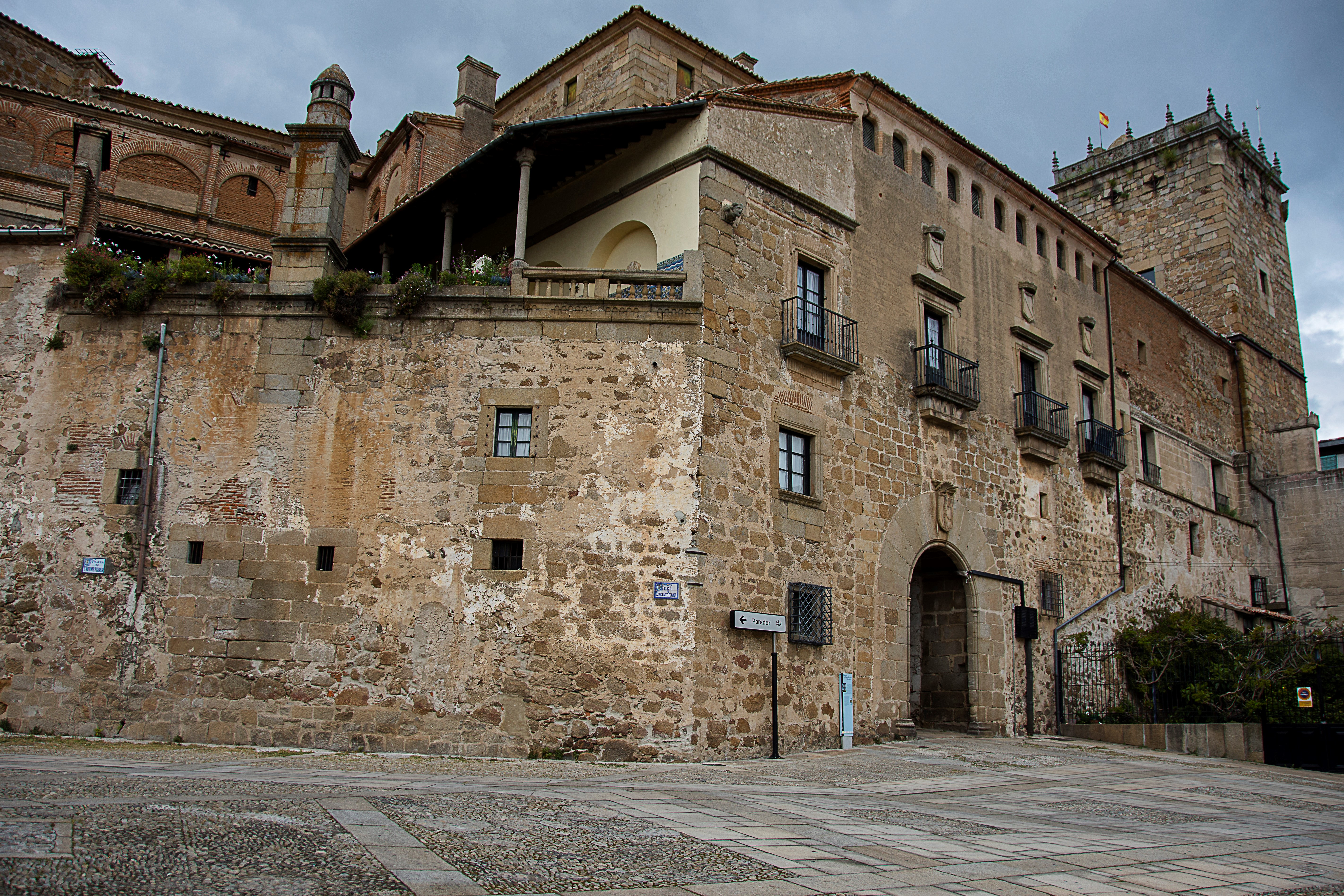 Palacio del marqués de Mirabel de Plasencia. (Provincia de Cáceres, España)